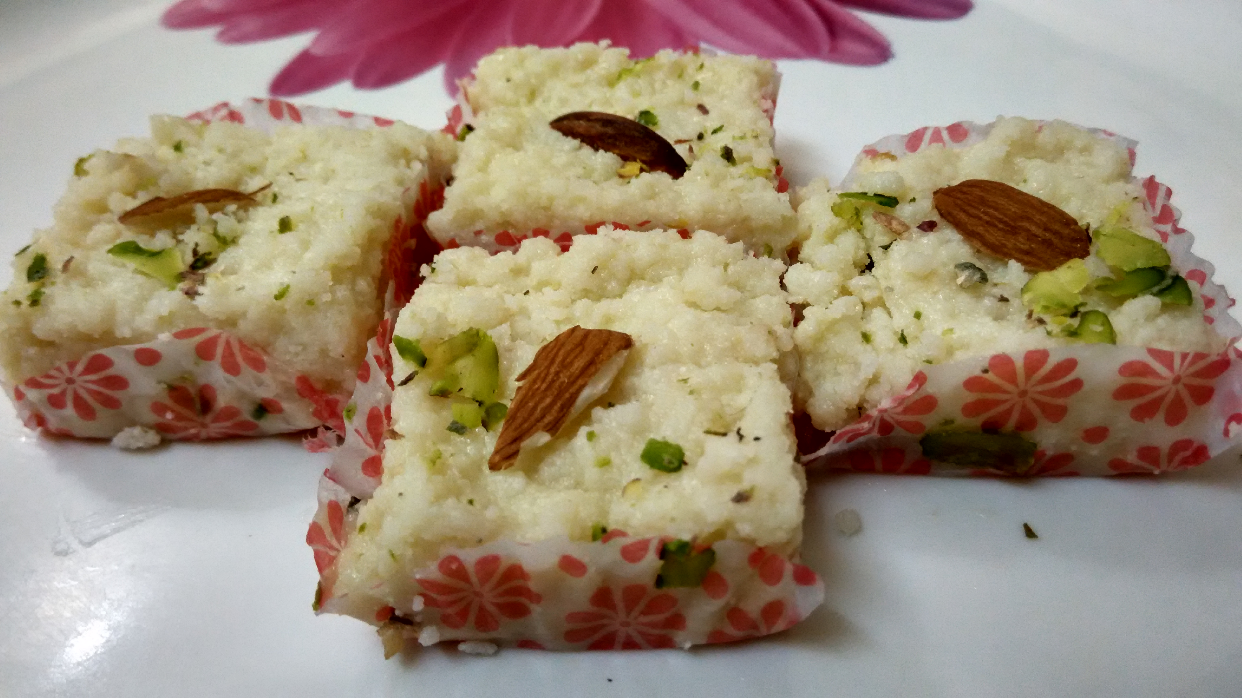 கலாகந்து.